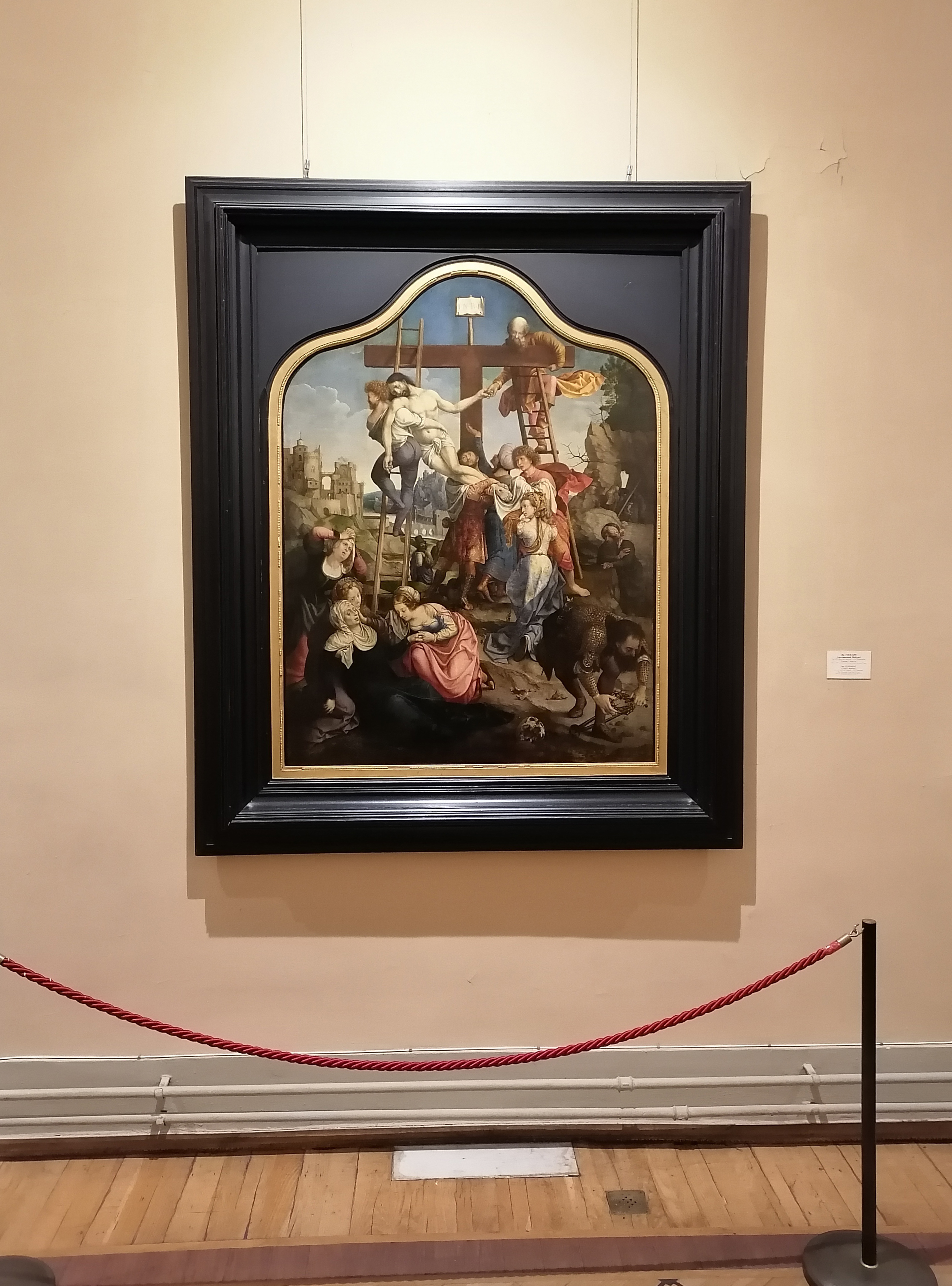 Малый Эрмитаж - зал 262